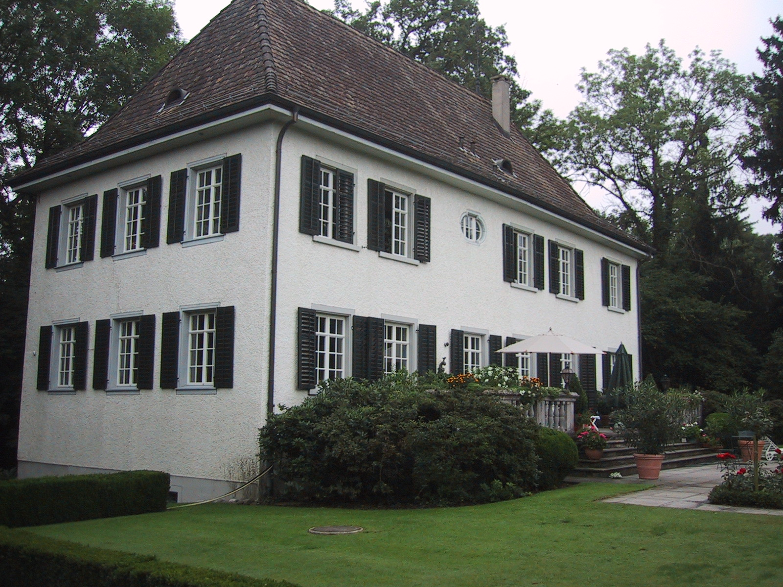 Schlösschen Irsee, Kreuzlingen, Kanton Thurgau